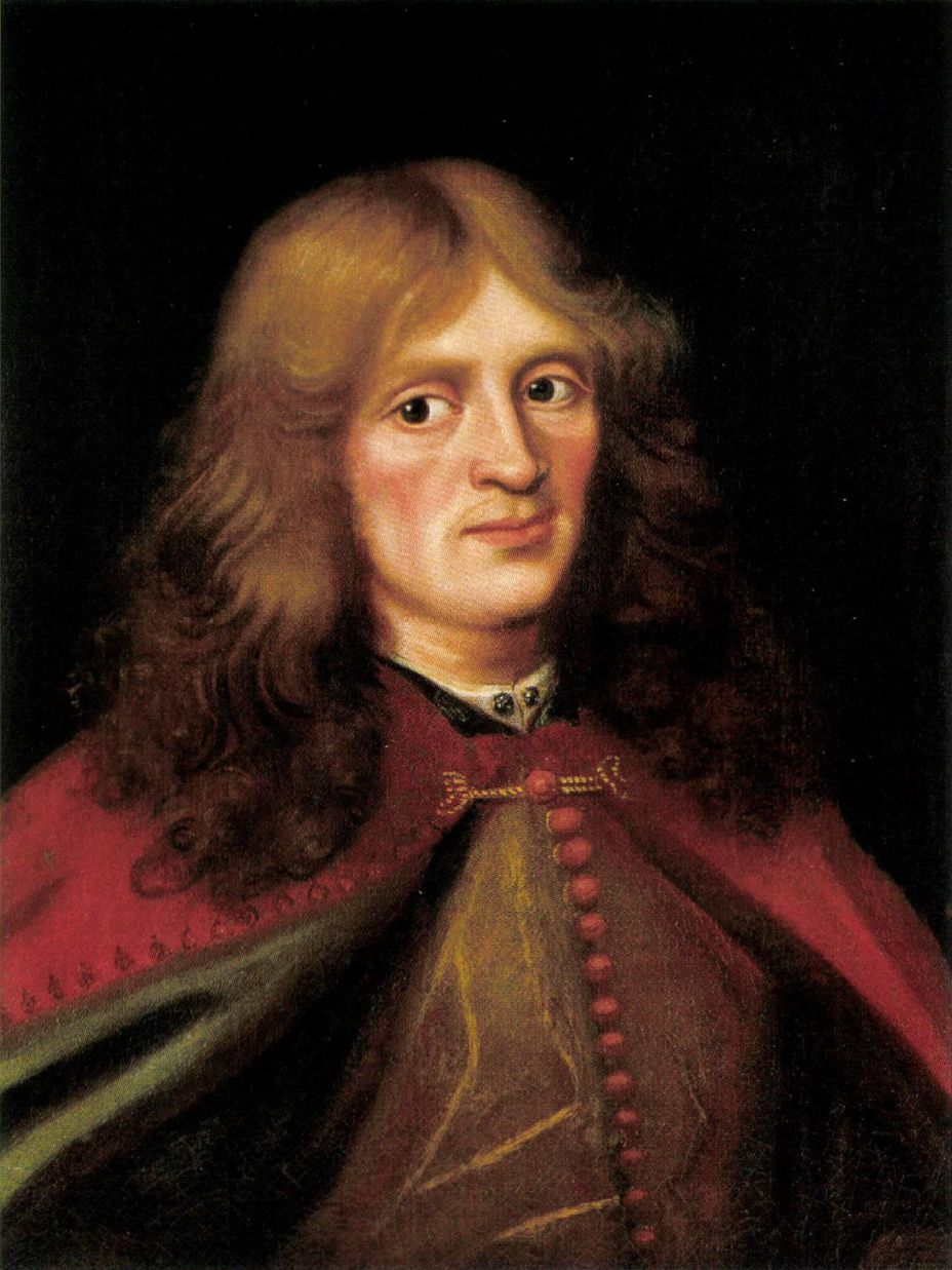 Nem hiteles arckép. A 19. századi hagyomány tartja Hunyadi László portréjának